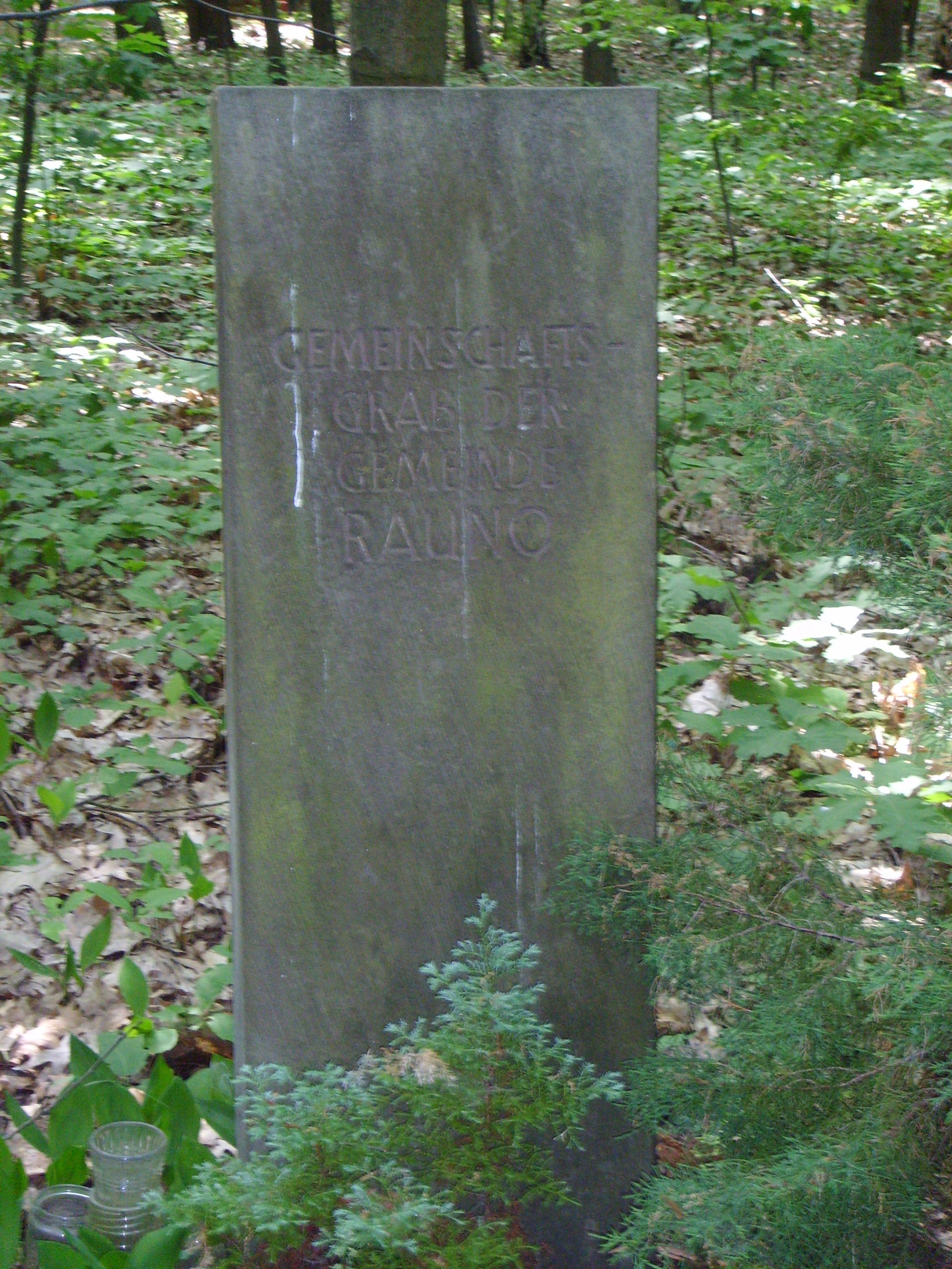 Grabstein des Gemeinschaftsgrabs der devastierten Gemeinde Rauno auf dem Waldfriedhof in Senftenberg